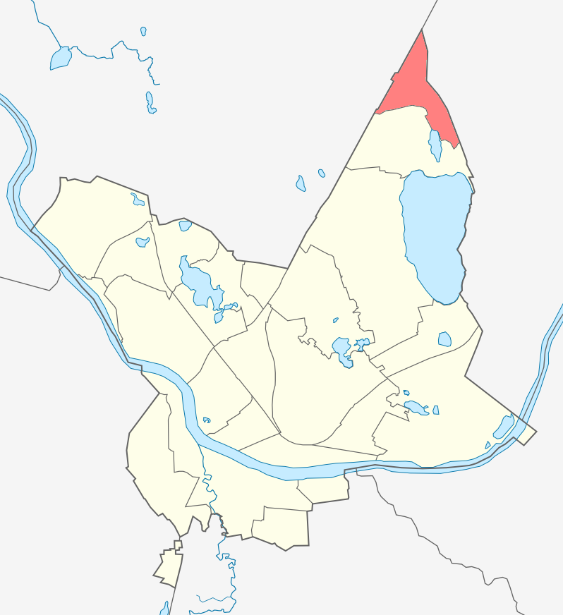 Микрорайон Крыжи карте Даугавпилса.